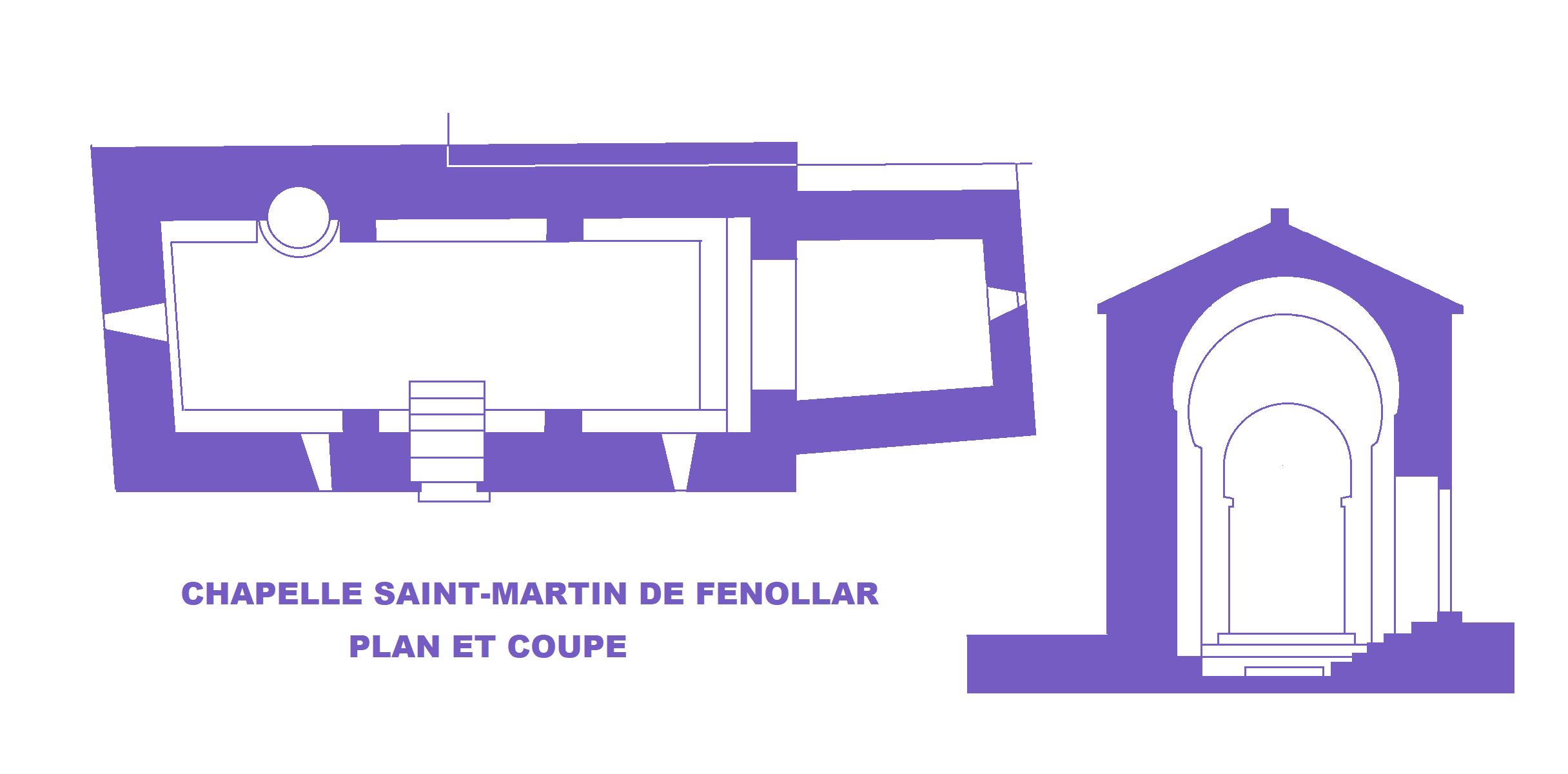 Chapelle Saint-Martin de Fenollar (66)